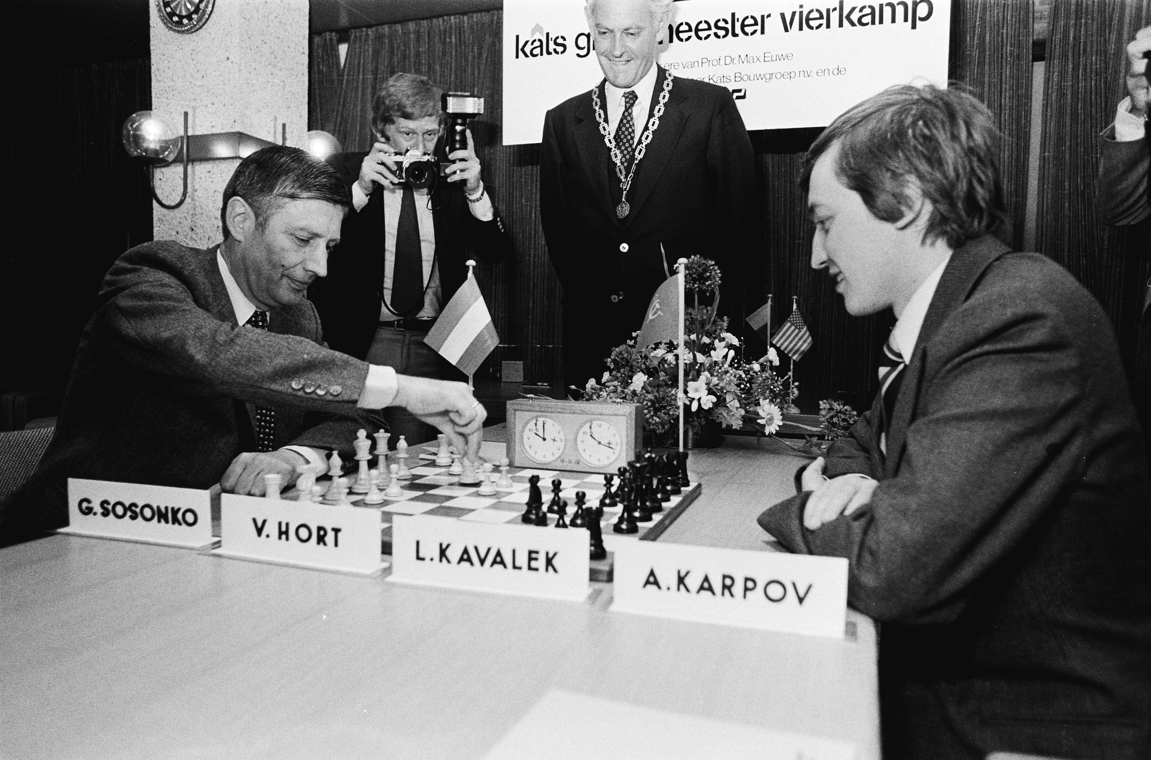 Collectie / Archief : Fotocollectie Anefo Reportage / Serie : Premier van Agt opent de schaakvierkamp in Waddinxveen; premier van Agt schaakt met Karpov Beschrijving : premiers, sport, schaken, openingen Datum : 11 juni 1979 Locatie : Waddinxveen, Zuid-Holland Trefwoorden : openingen, premiers, schaken, sport Persoonsnaam : Agt, Dries van, Karpov, Anatoli Fotograaf : Suyk, Koen / Anefo Auteursrechthebbende : Nationaal Archief Materiaalsoort : Negatief (zwart/wit) Nummer archiefinventaris : bekijk toegang 2.24.01.05 Bestanddeelnummer : 930-3082